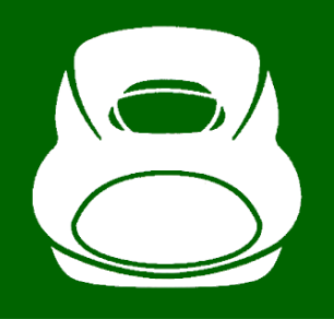 JR東日本 新幹線シンボルマーク